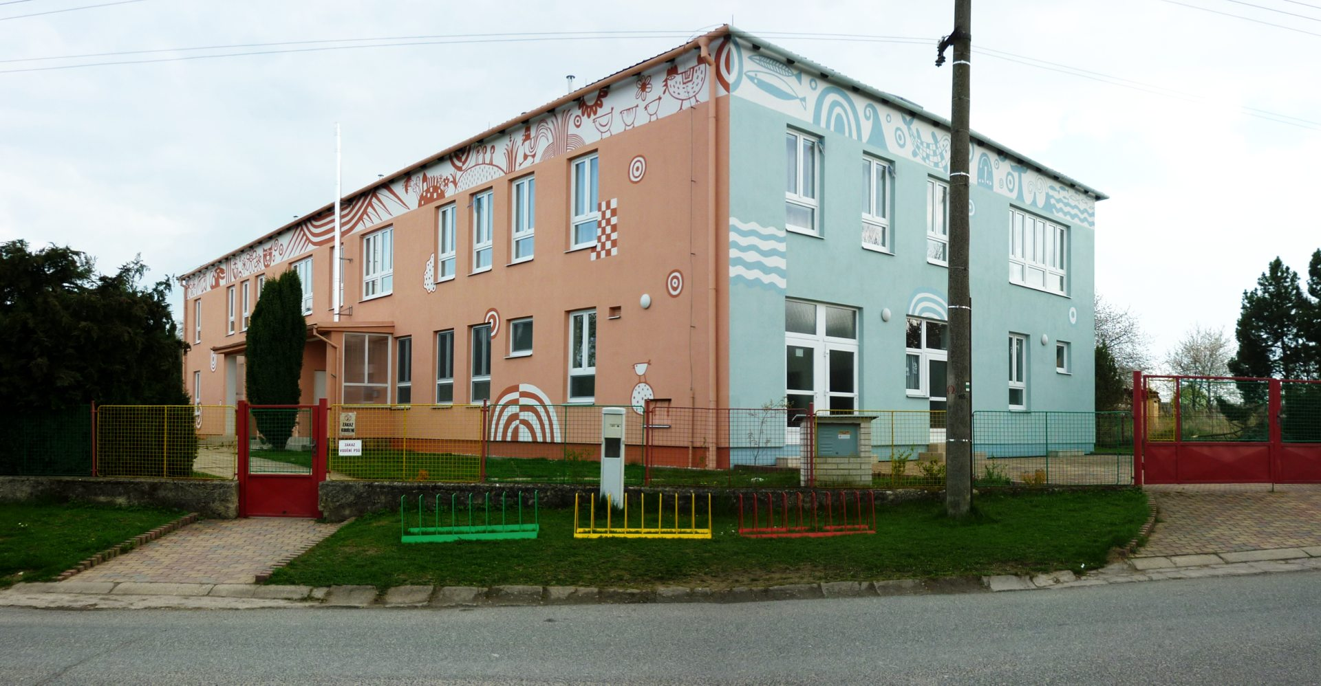 Mateřská škola ve Slavonicích pro 120 dětí